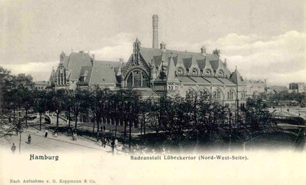 Badeanstalt Lübecker Tor in Hamburg, eröffnet 1905